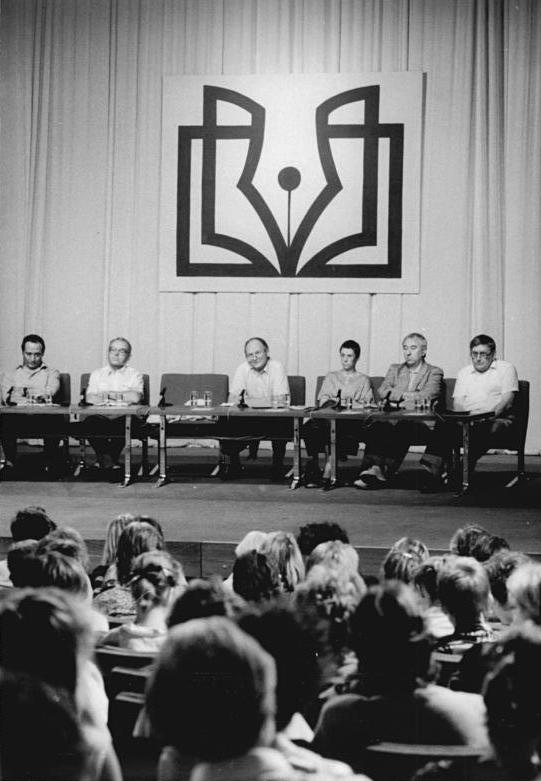 ADN-ZB-Senft-21.9.1989. Berlin: Schriftstellerlesung. Zu einer Lesung anläßlich des 40. Jahrestages der DDR-Gründung hatte der Schriftstellerverband in das Maxim-Groki-Theater eingeladen. Insgesamt 13 Autoren-hier Walter Flegel, Günter Görlich, Hermann Kant, Kerstin Hensel, Gerhard Heltz-Baumert und Heinz Knobloch (v.l.n.r.) - trugen Texte über Vergangenes und Gegenwärtiges in unserem Land vor.